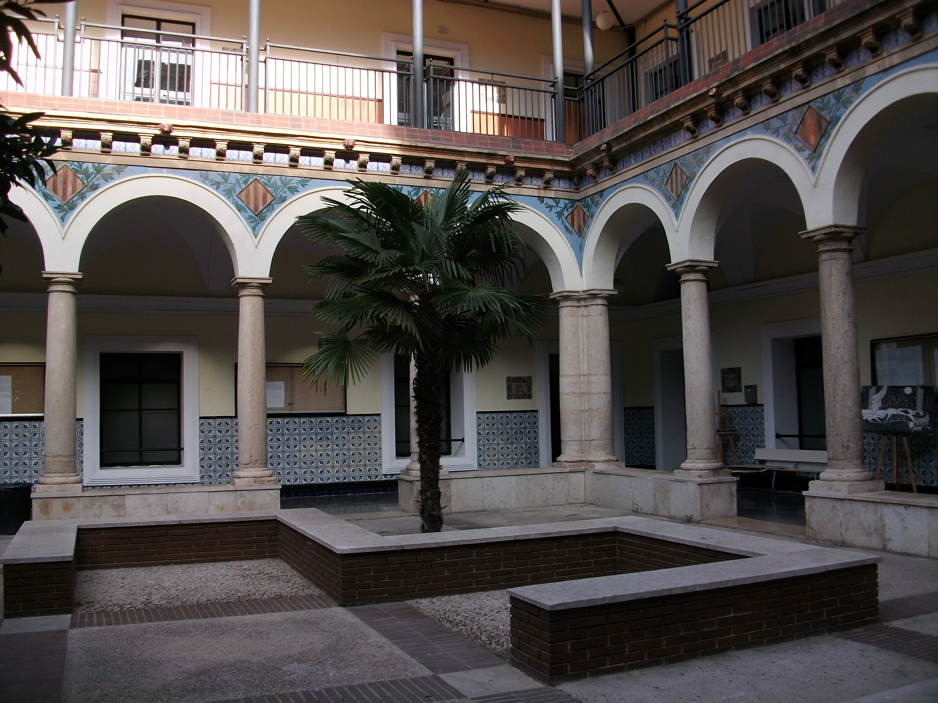 Claustre de l'institut Lluís Vives de València, antic Col·legi de sant Pau.